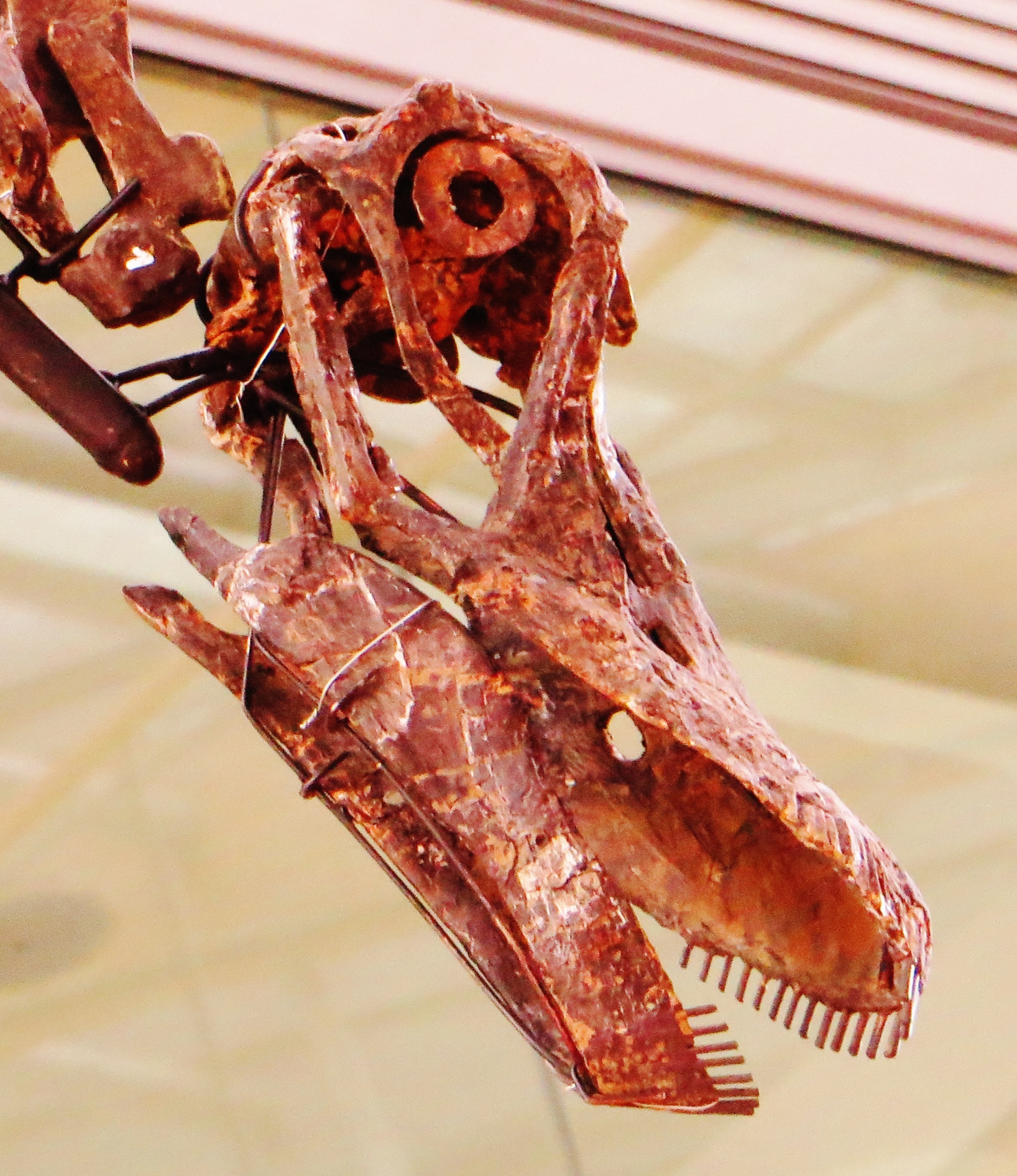 Fossil of Kaatedocus - Took the picture at Muse, Trento